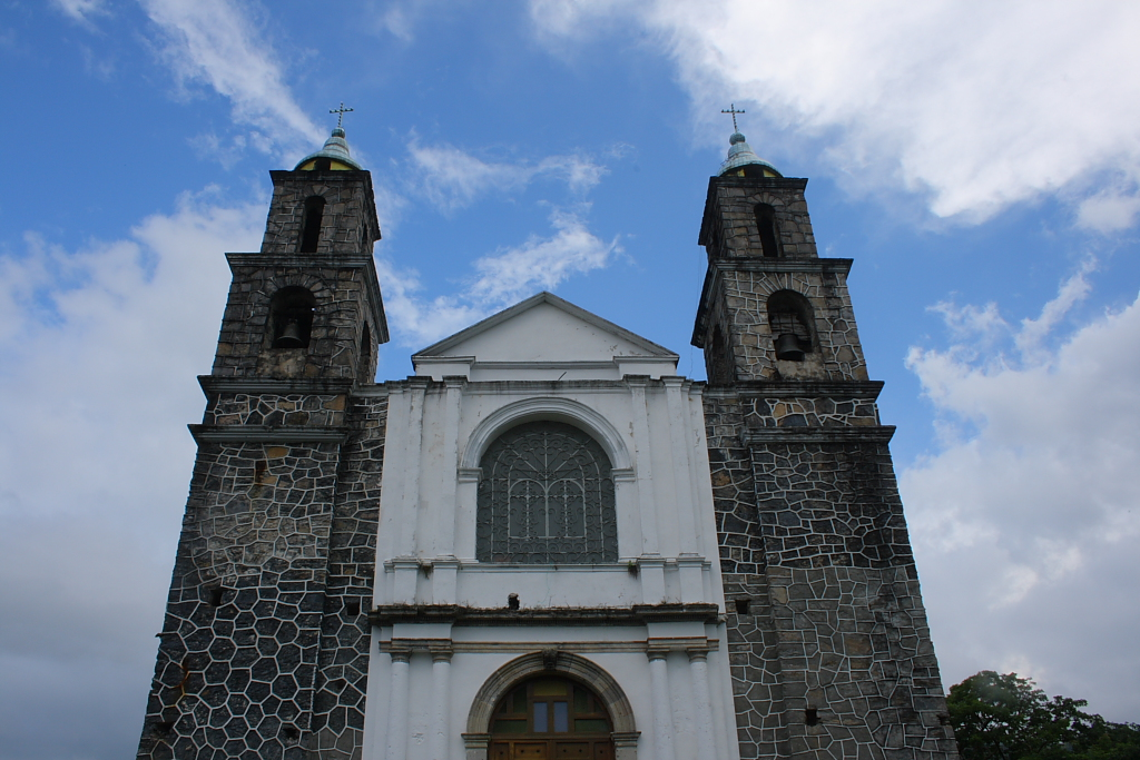 Capilla de la Virgen de Guadalupe en Xochitlán de Vicente Suárez, Puebla.